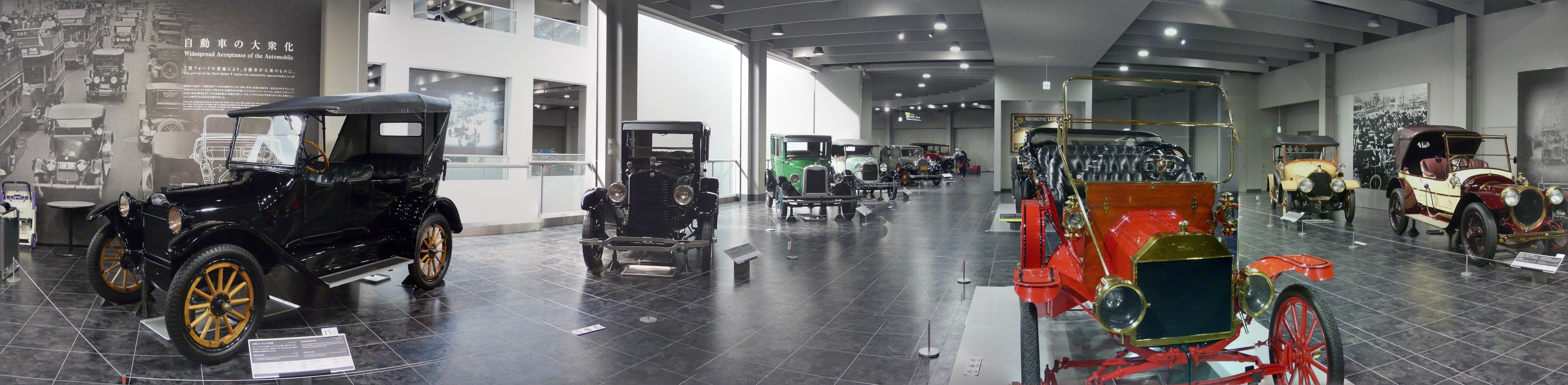 トヨタ博物館本館に展示している車。 Panasonic Lumix DMC-FZ18